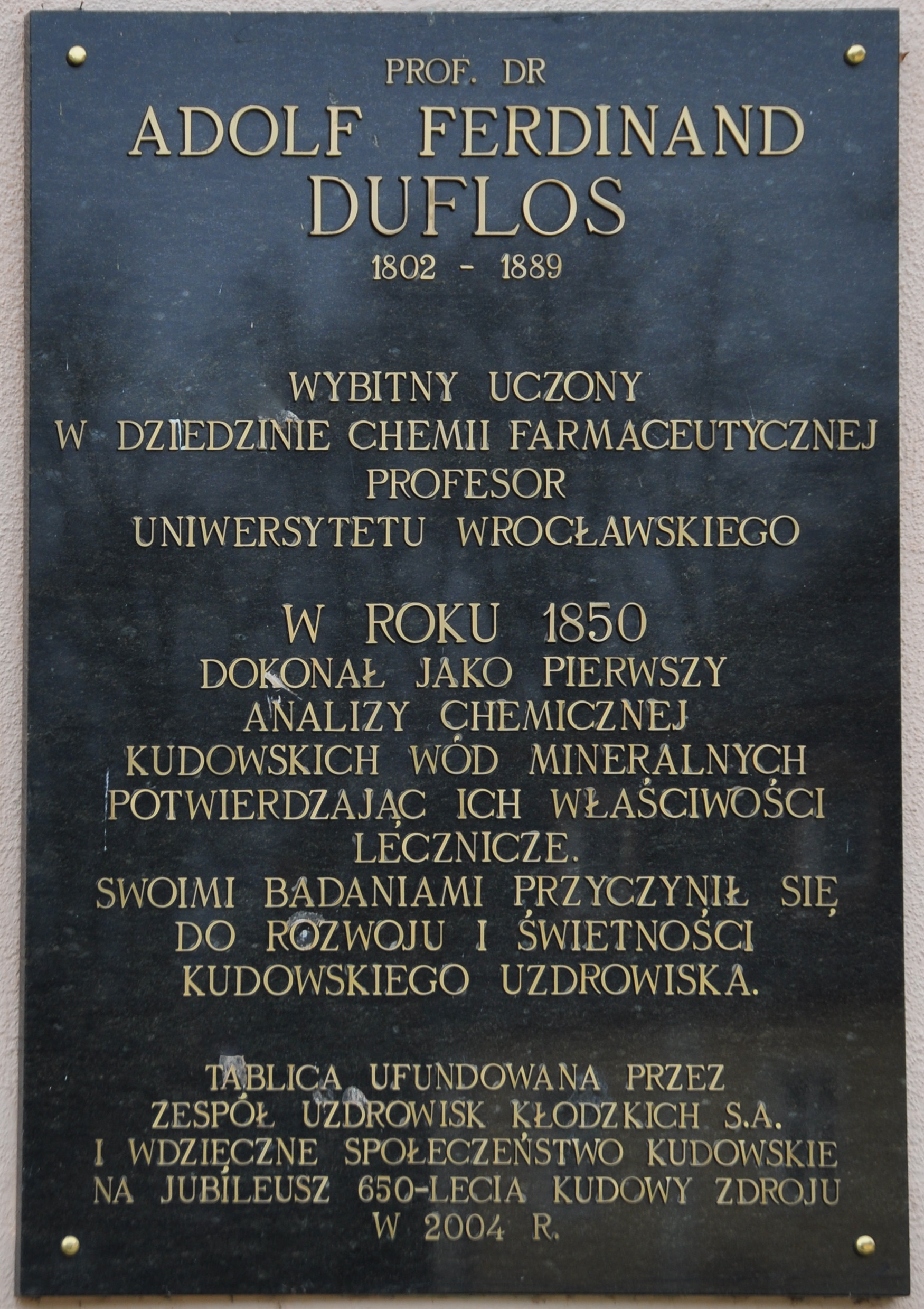 Plaque commémorative des travaux d'Adolf Ferdinand Duflos à Kudowa-Zdrój